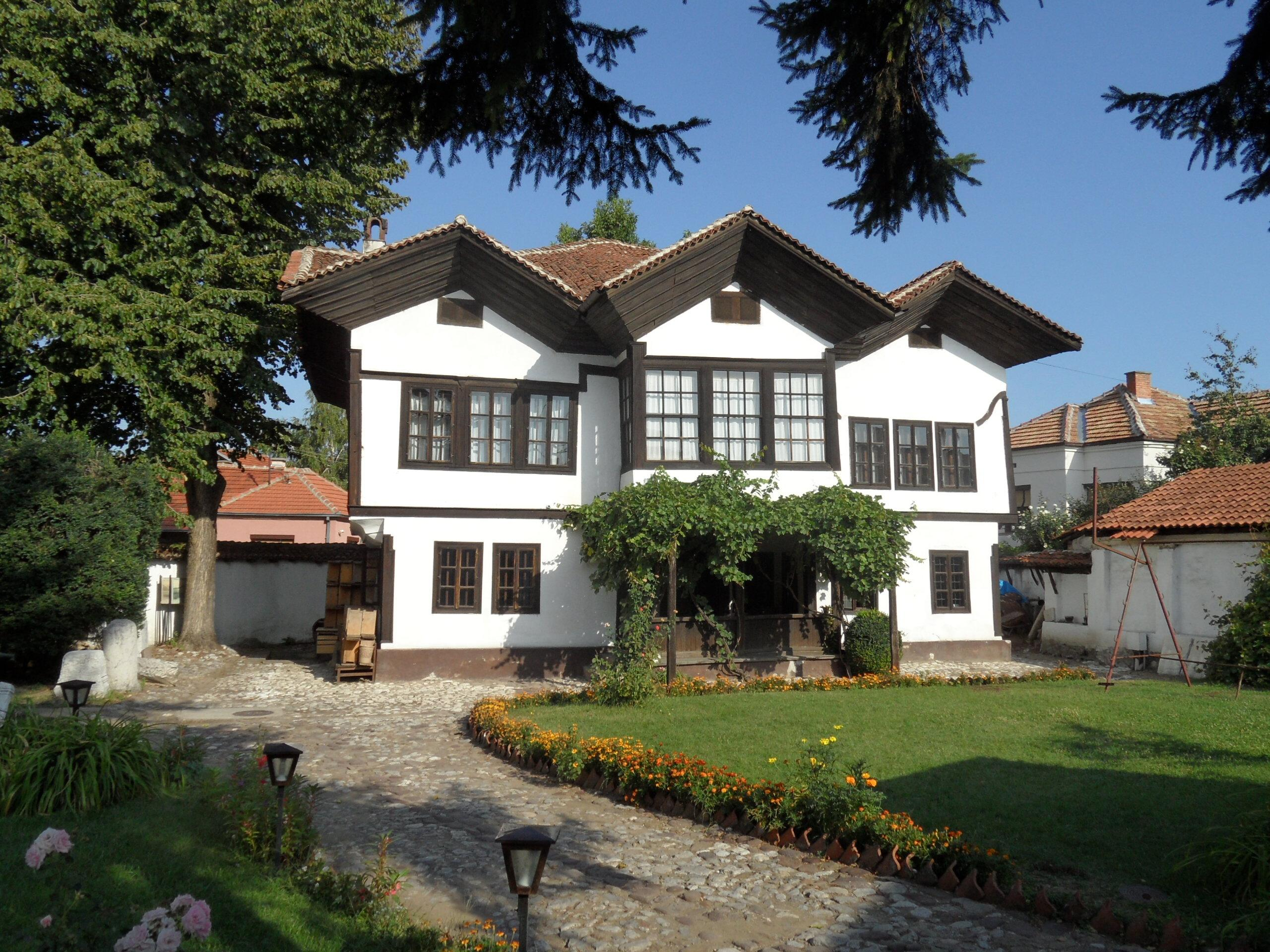 Конак Малог Ристе у Пироту